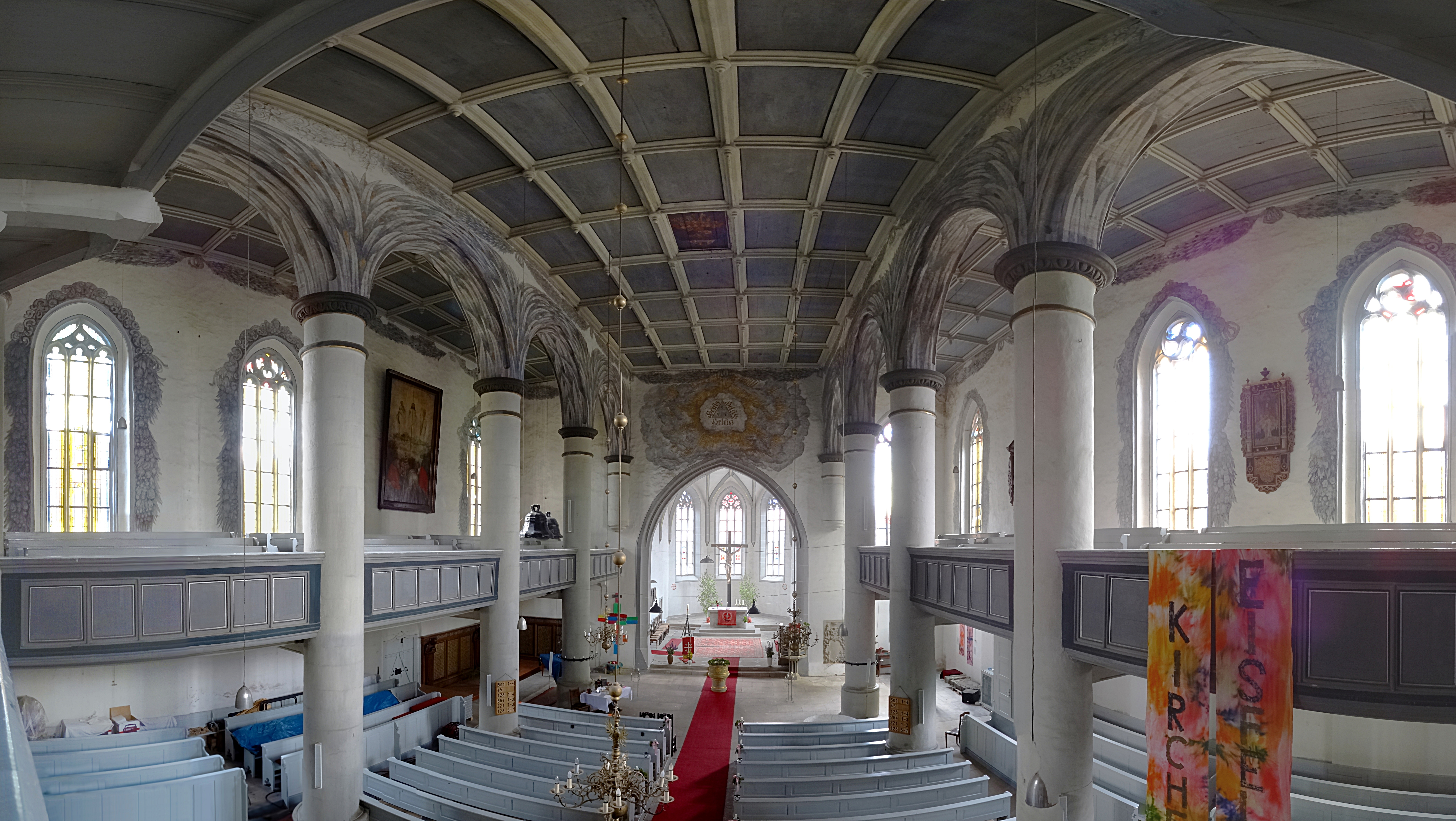 Innenraum Panorama der spätgotischen Dreifaltigkeitskirche St. Nikolai, Eisfeld